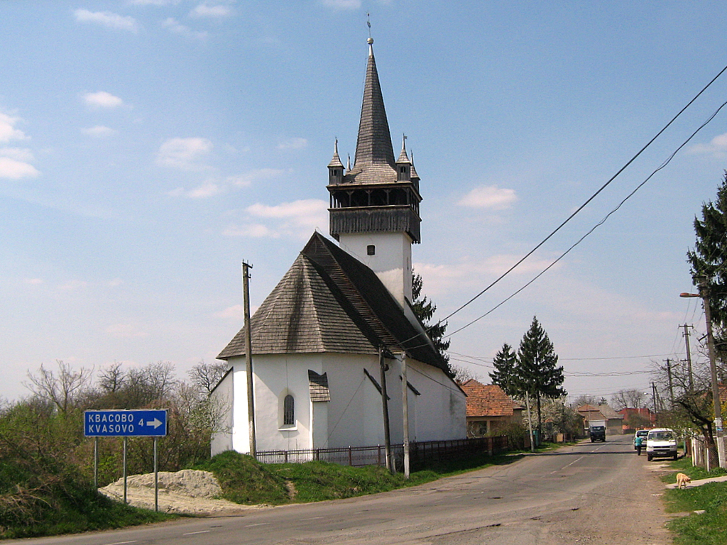 Костел в с.Бэнэ (Закарпатская область)